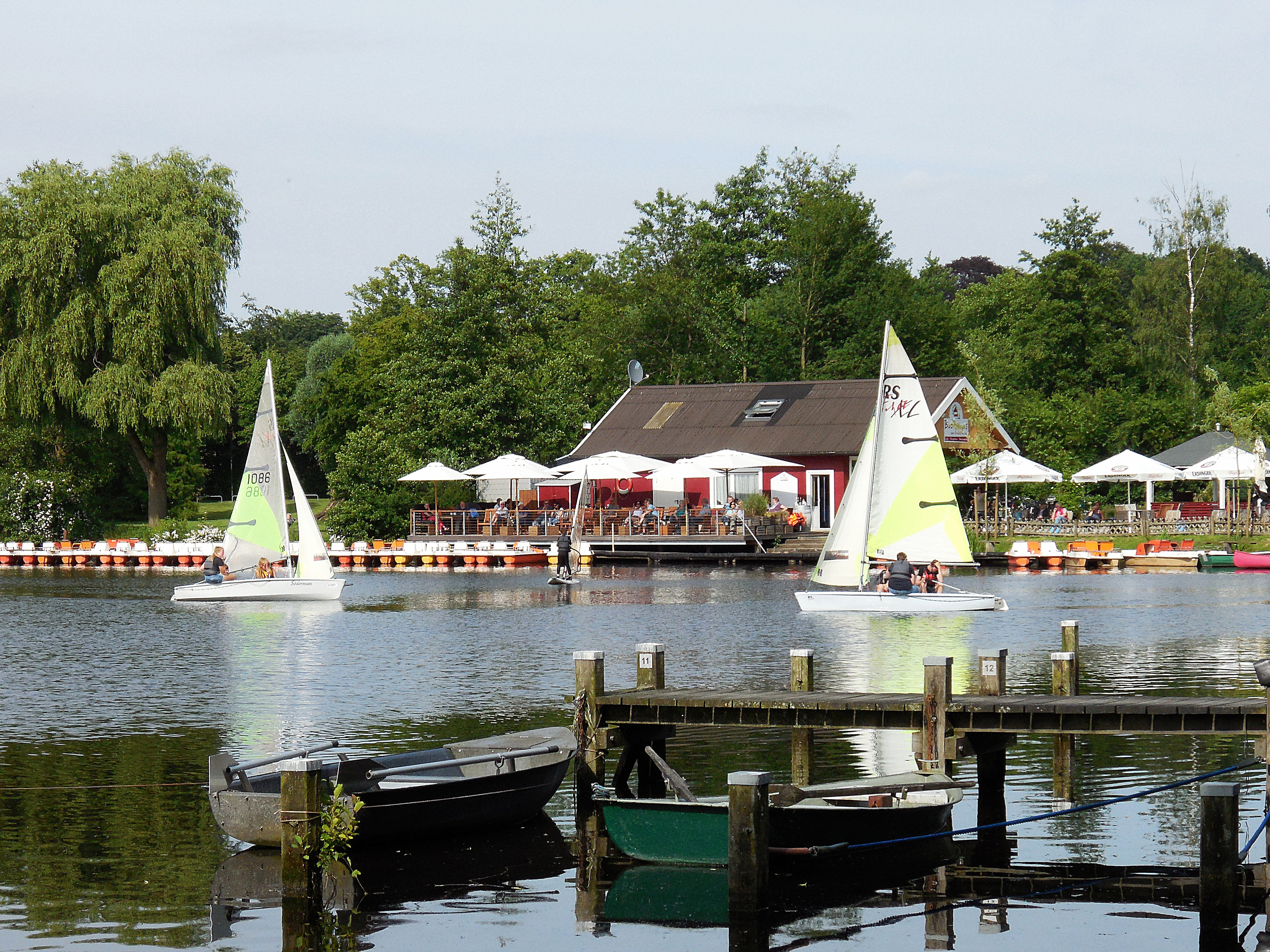 Segelboote, Surfer, Tretboote und Ruderboote sind nur eine Freizeitmöglichkeiten am Pröbstingseee Borken, Kreis Borken, NRW, Deutschland